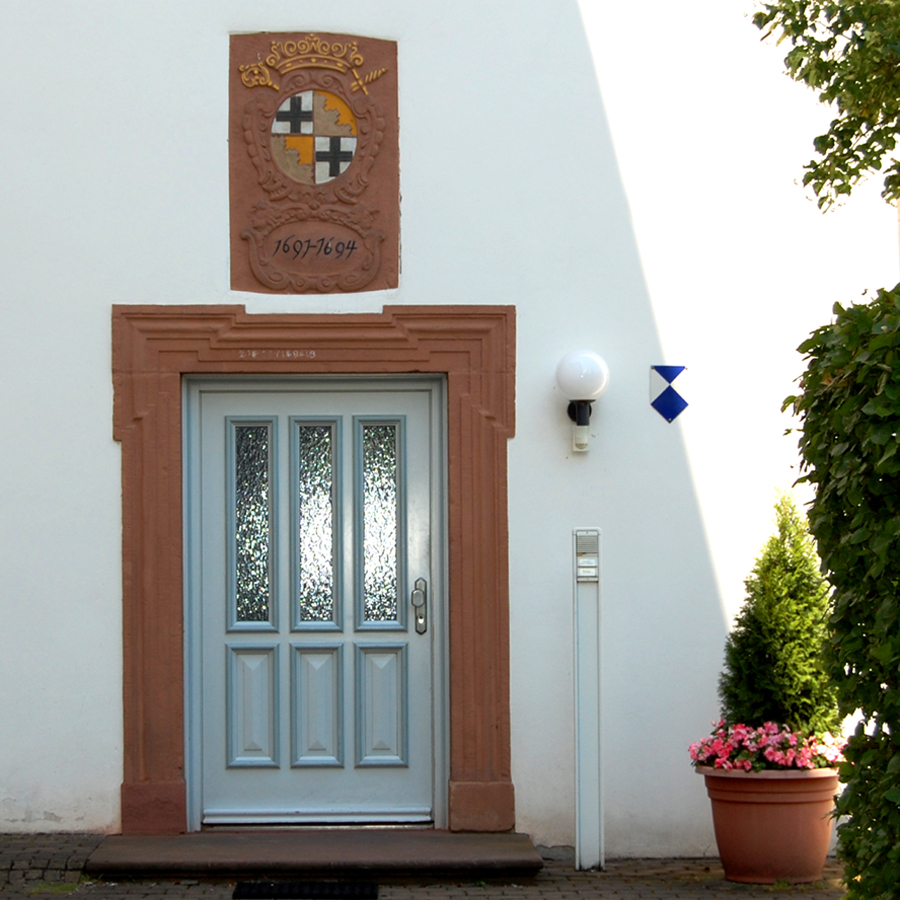 Wappen des Fürstabtes von Fulda Placidus von Droste (1678 - 1700), darunter die Jahreszahlen des 1. Bauabschnitts des Franziskanerklosters Salmünster. Es ist seit 2004 ein Bildungs- und Exerzitienhaus des Bistums Fulda.